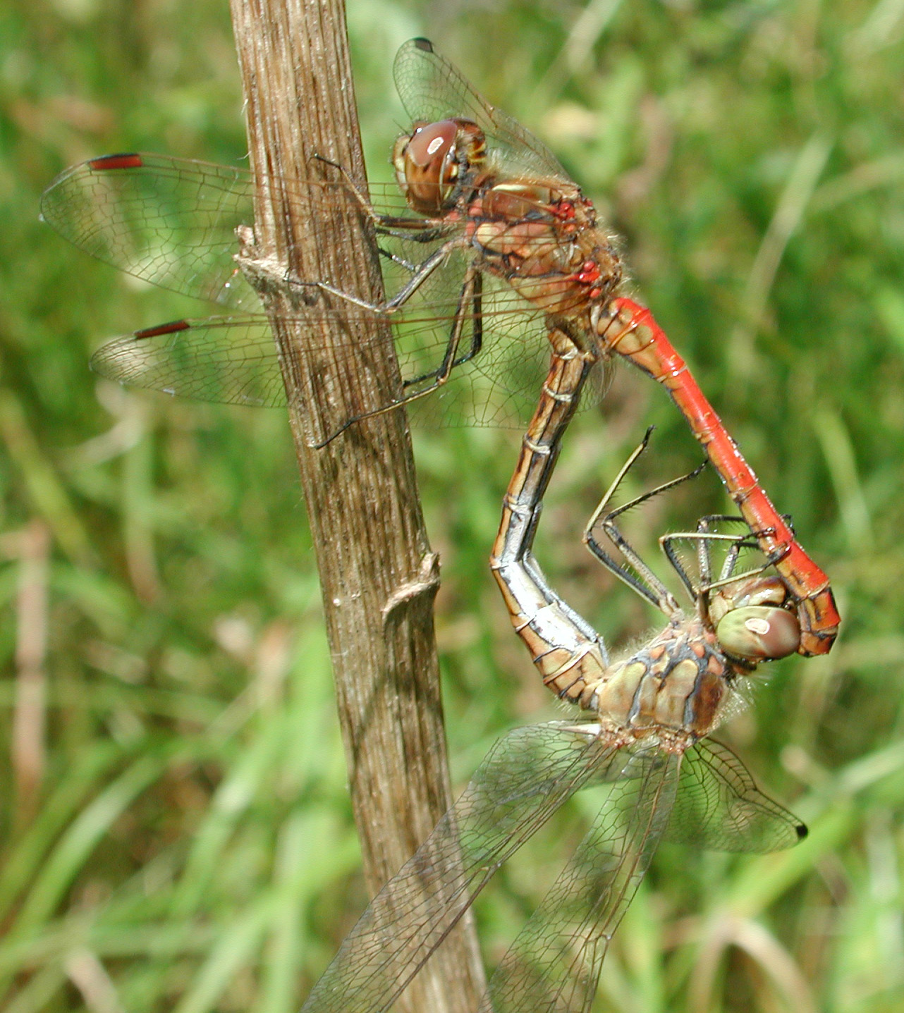 Sympetrum vulgatum, tandem, NSG Kirchwerder Wiesen, Elbmarsch bei Hamburg, Germany